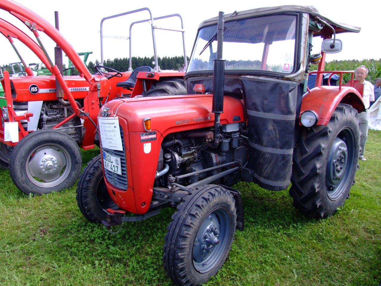 Massey Ferguson 35 mit 35 PS, Baujahr 1963; links ein Massey-Ferguson-Traktor 155